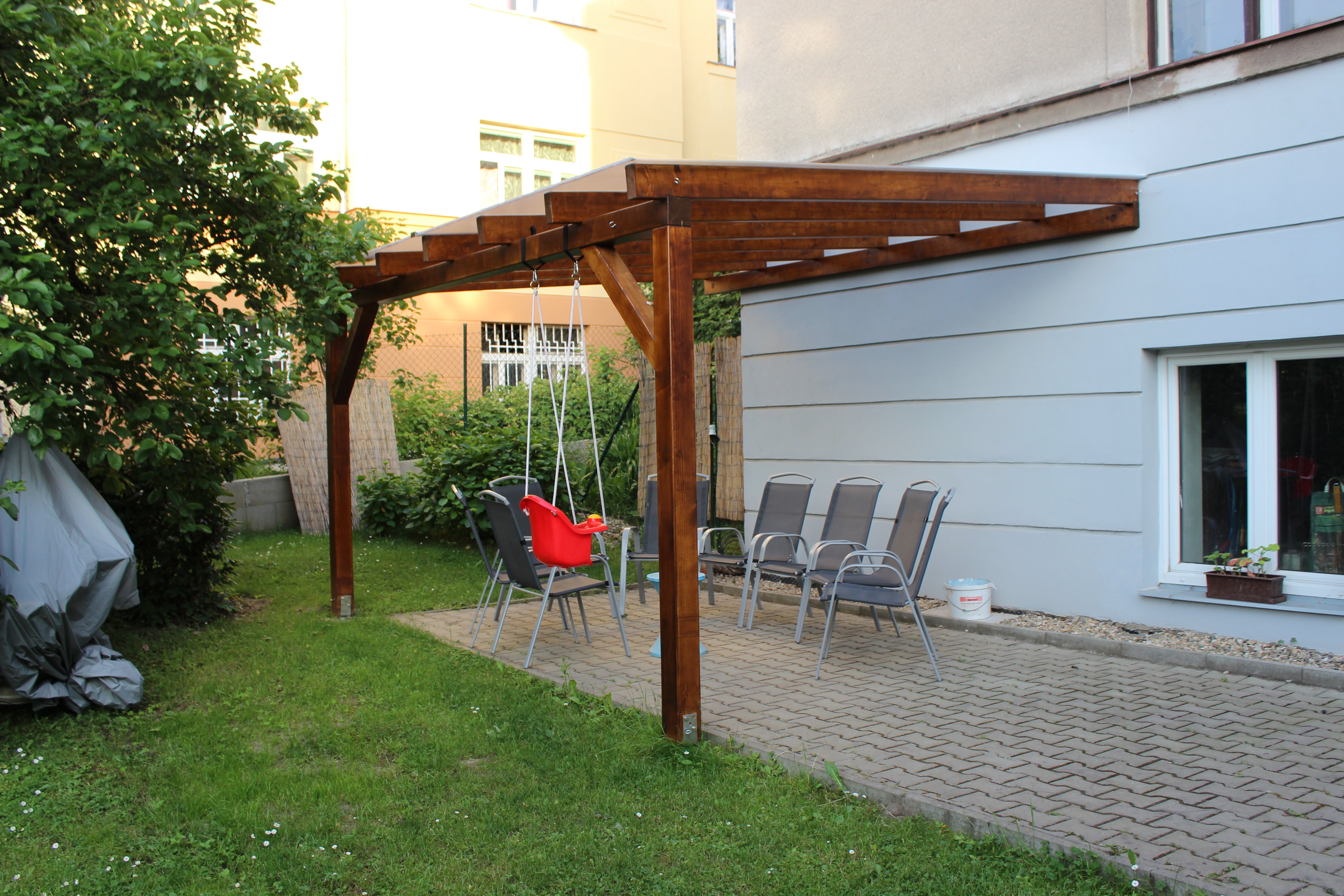 Zahradní pergola u českého domu.